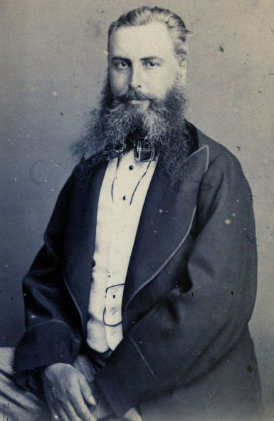 Thomas Laxton (1830–1893), Pflanzenzüchter